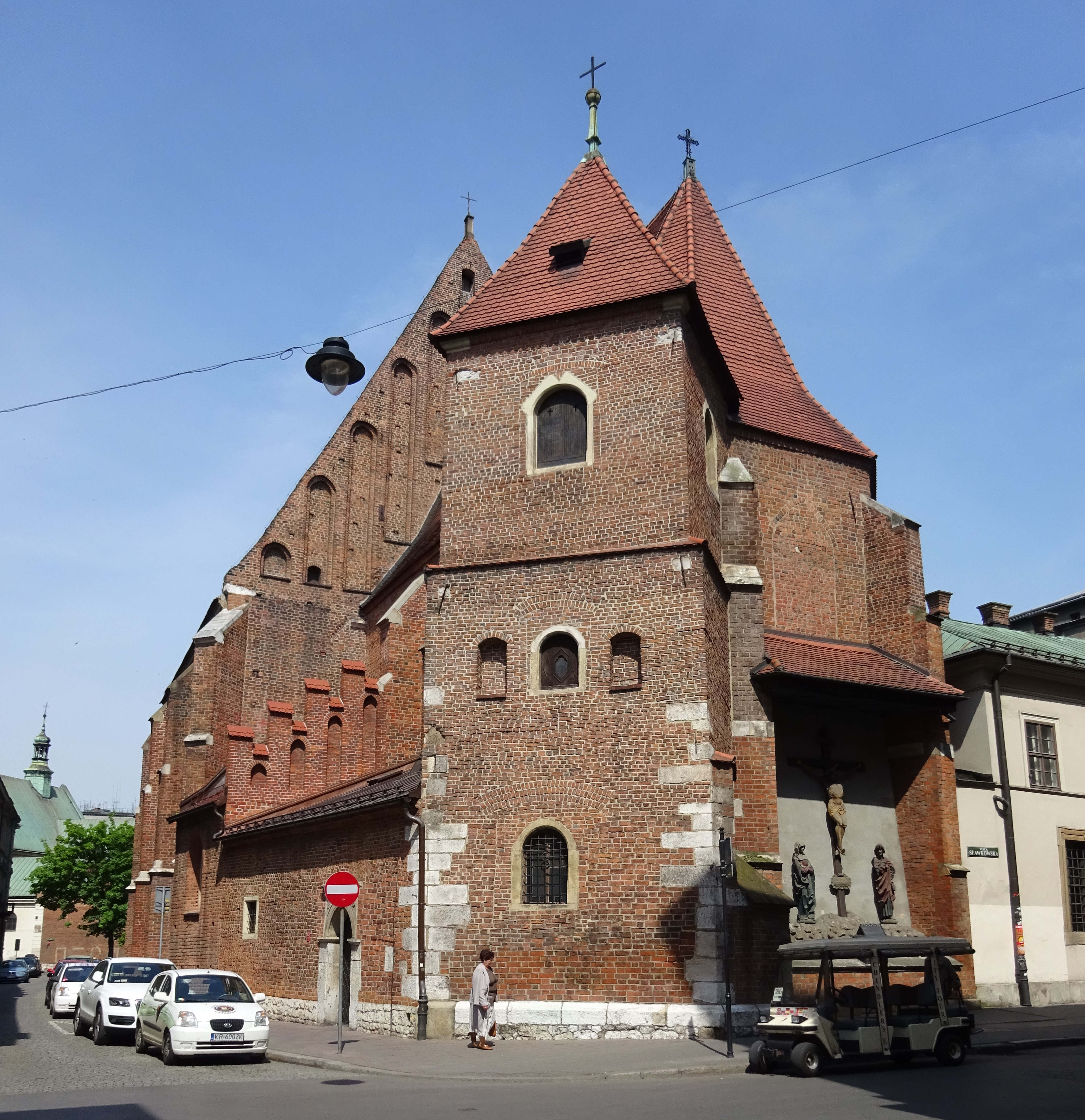 Kościół św. Marka w Krakowie, na Starym Mieście. Widok ze skrzyżowania ul. Św. Marka i Sławkowskiej. 2016